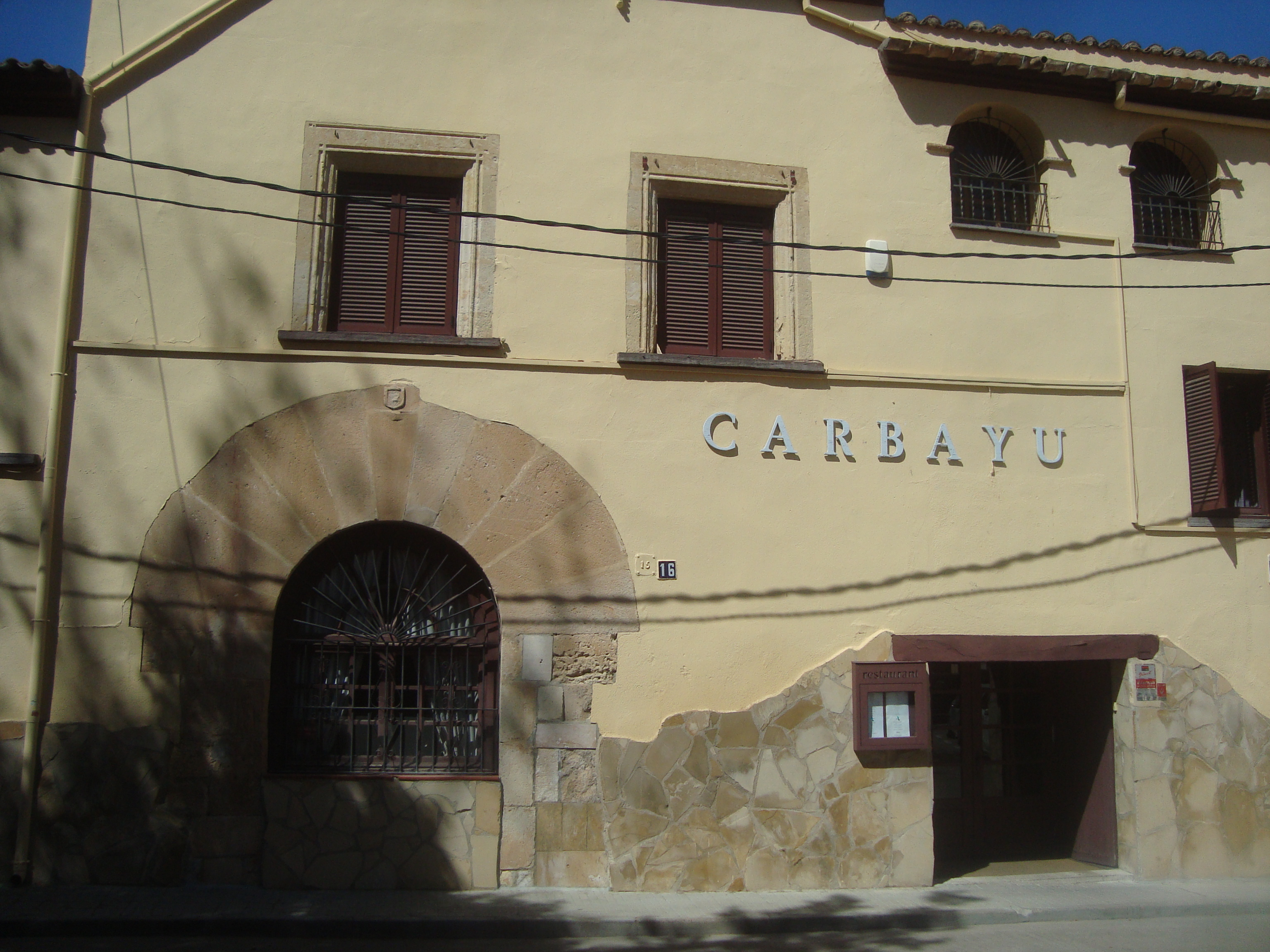 Casa del Marquès de Vallgornera (el Morell)